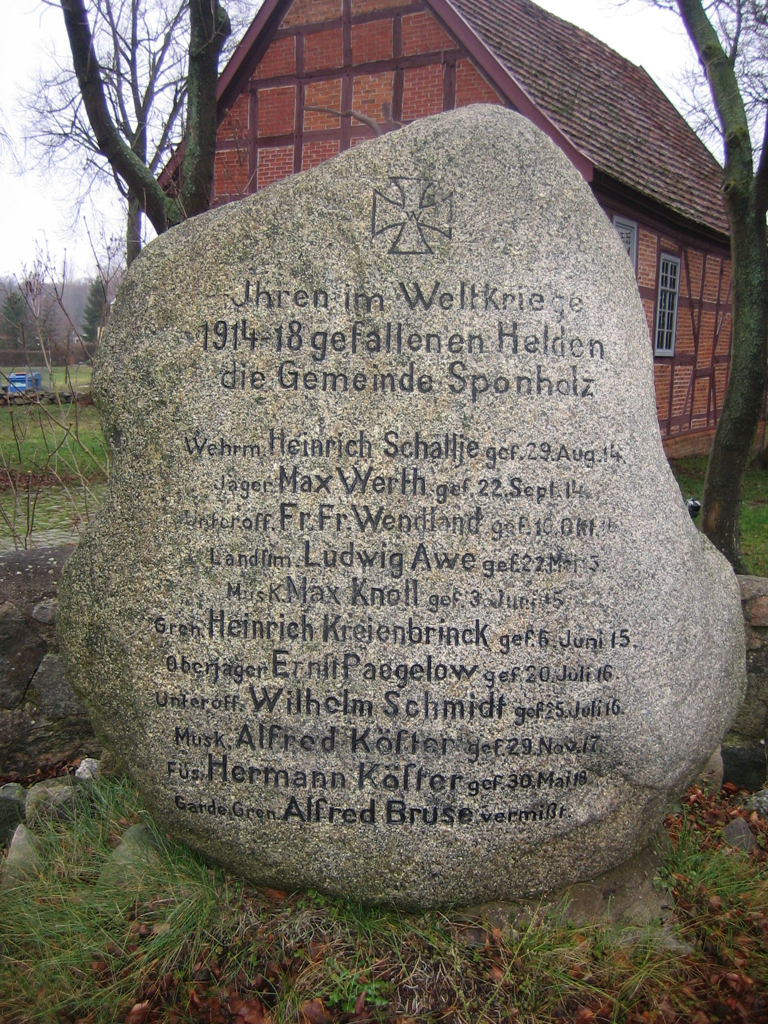 Gedenkstein für die gefallen Soldaten des Ersten Weltkrieges der Gemeinde Sponholz, Landkreis Mecklenburgische Seenplatte